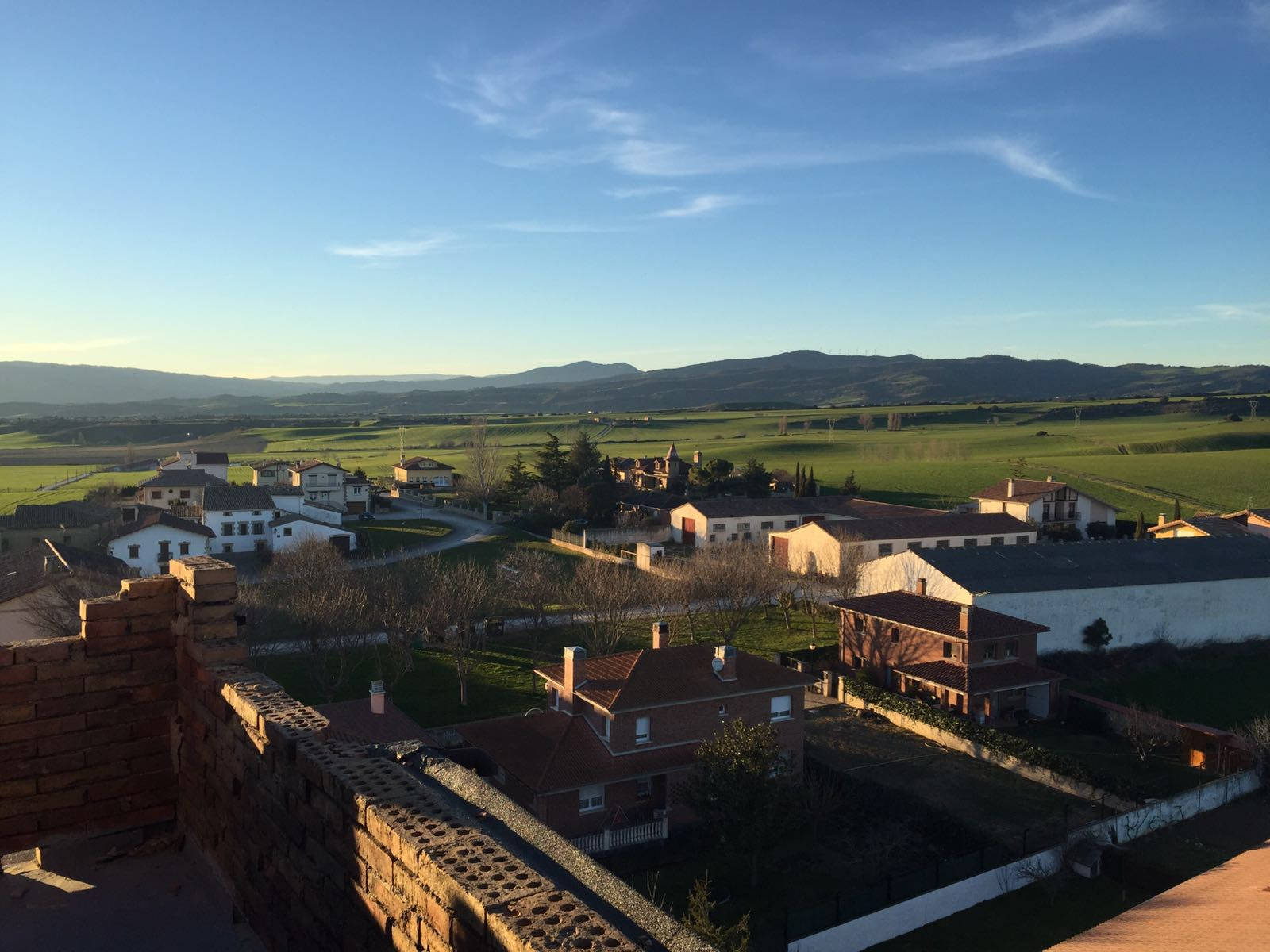 Adiós, Navarra, España